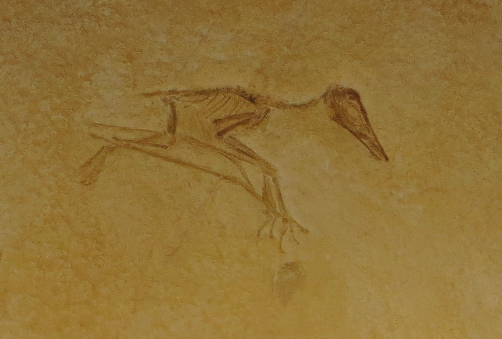 Fossil of Pterodactylus - Took the picture at Natural History Museum, Bonn University